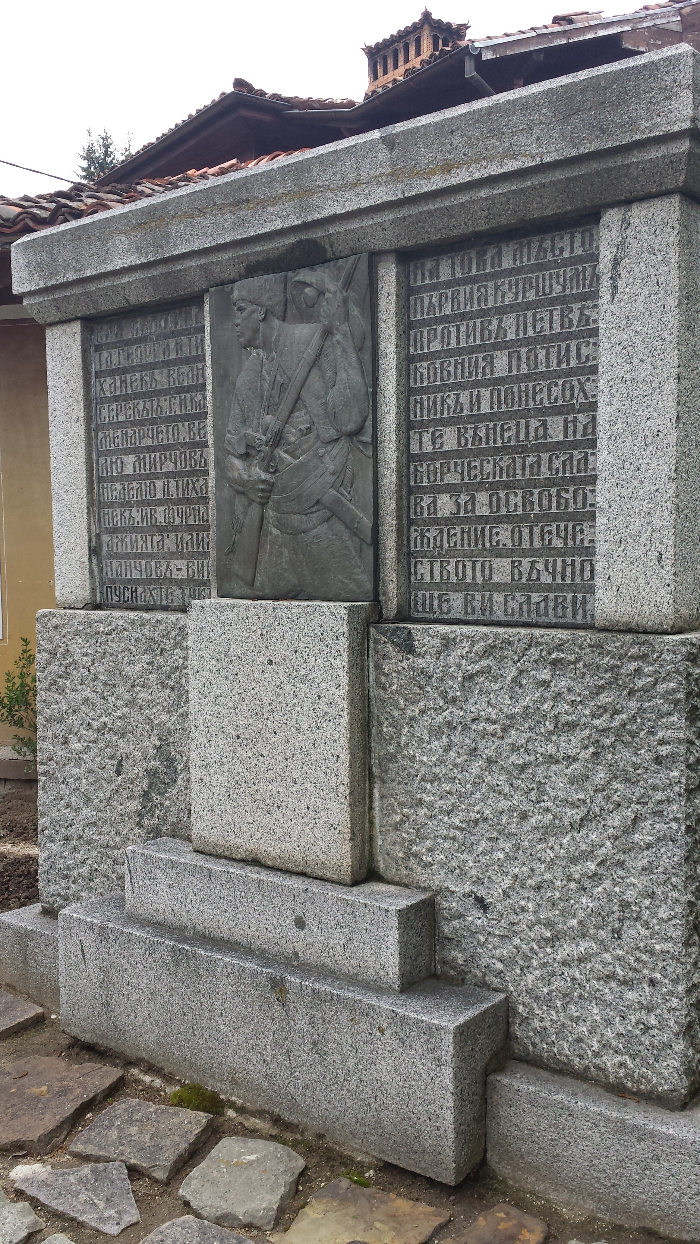 Барелеф в памет на обявяването на Априлското въстание